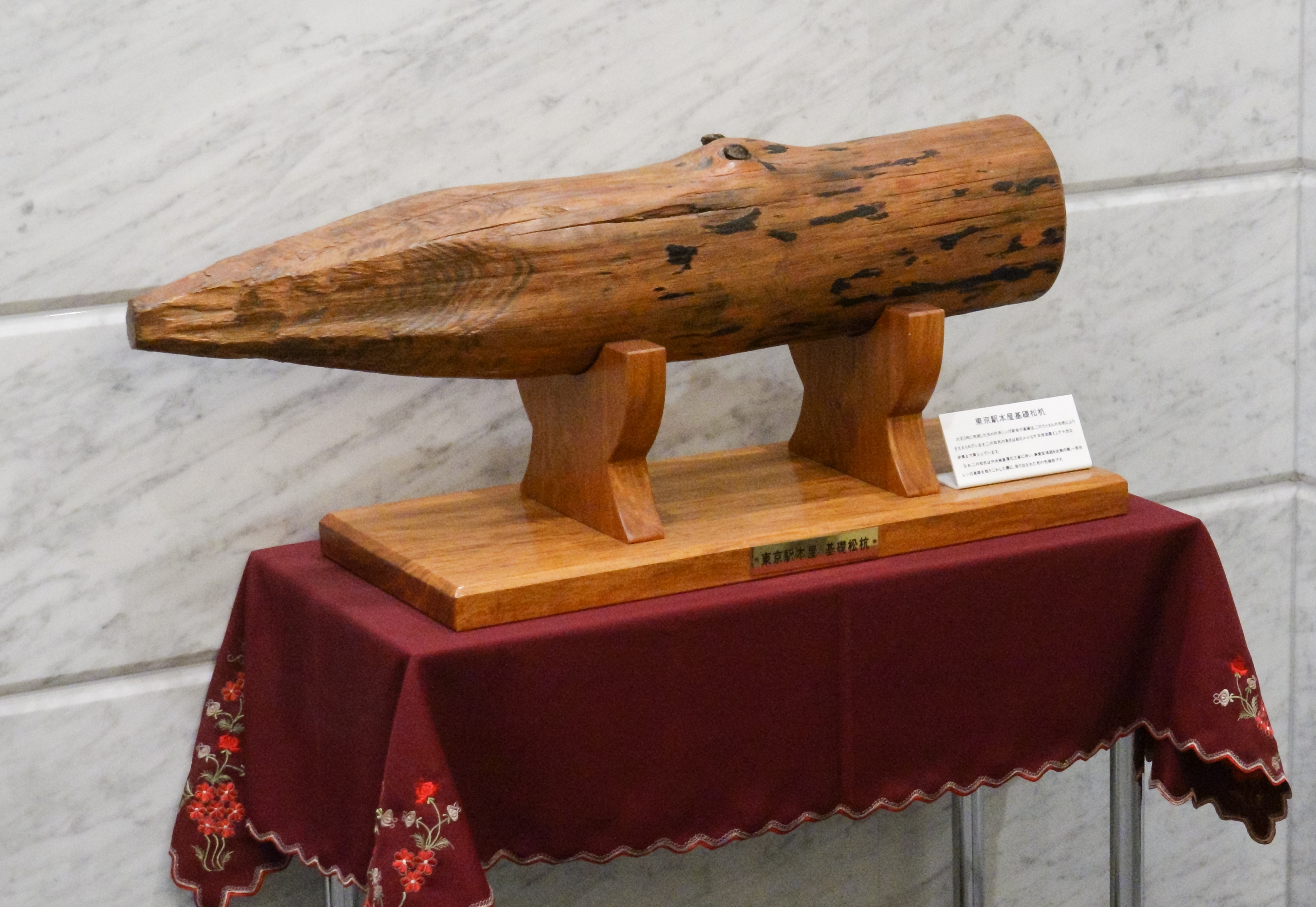 東京駅本屋 基礎松杭 （JR東日本 東京駅 駅長室前に展示、 東京駅ミッドナイトツアーで許可を得て撮影）